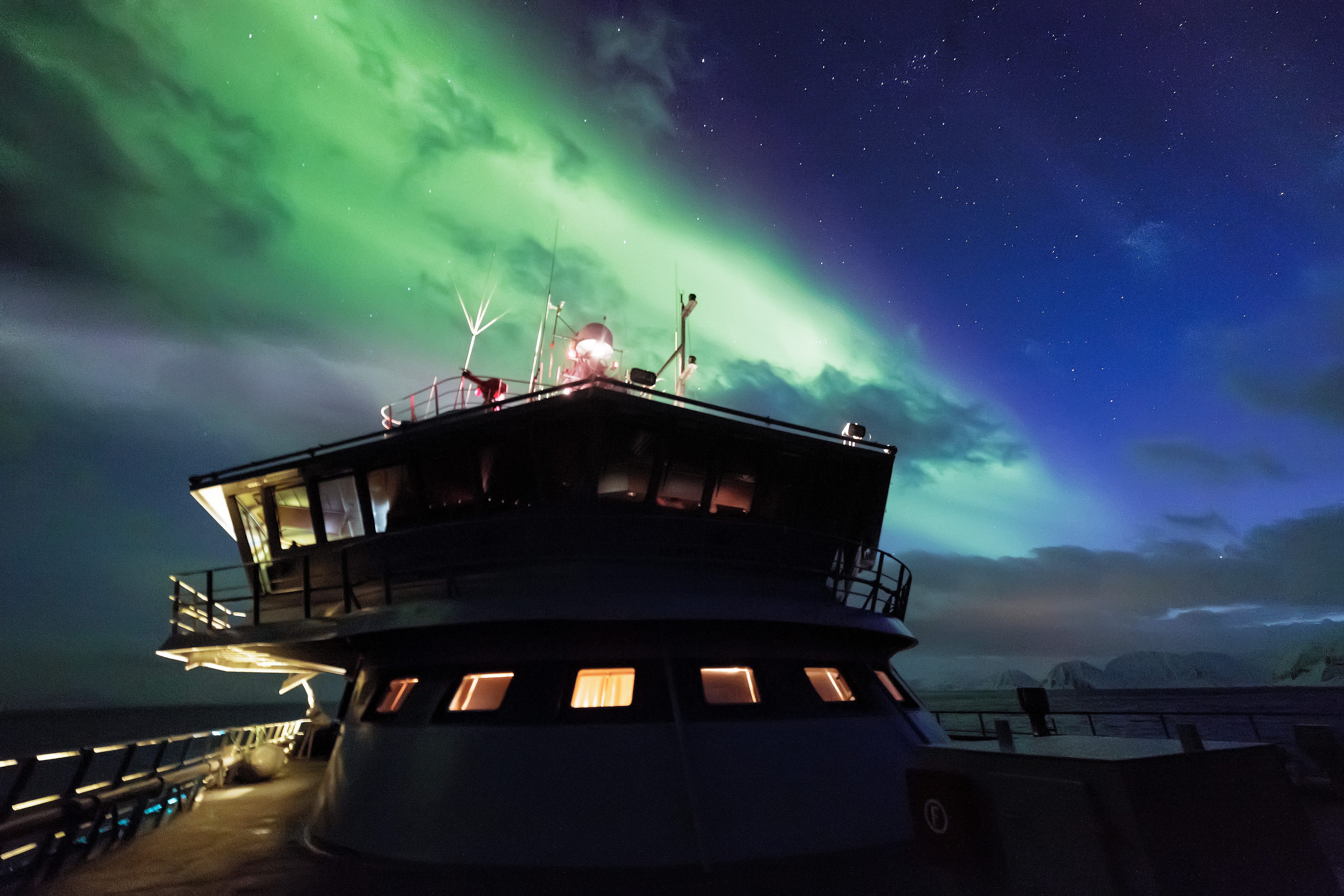 Nordlys over bro i Tanafjorden i forbindelse med Joint Viking. KV Harstad er for tiden med på øvelsen Joint Viking.